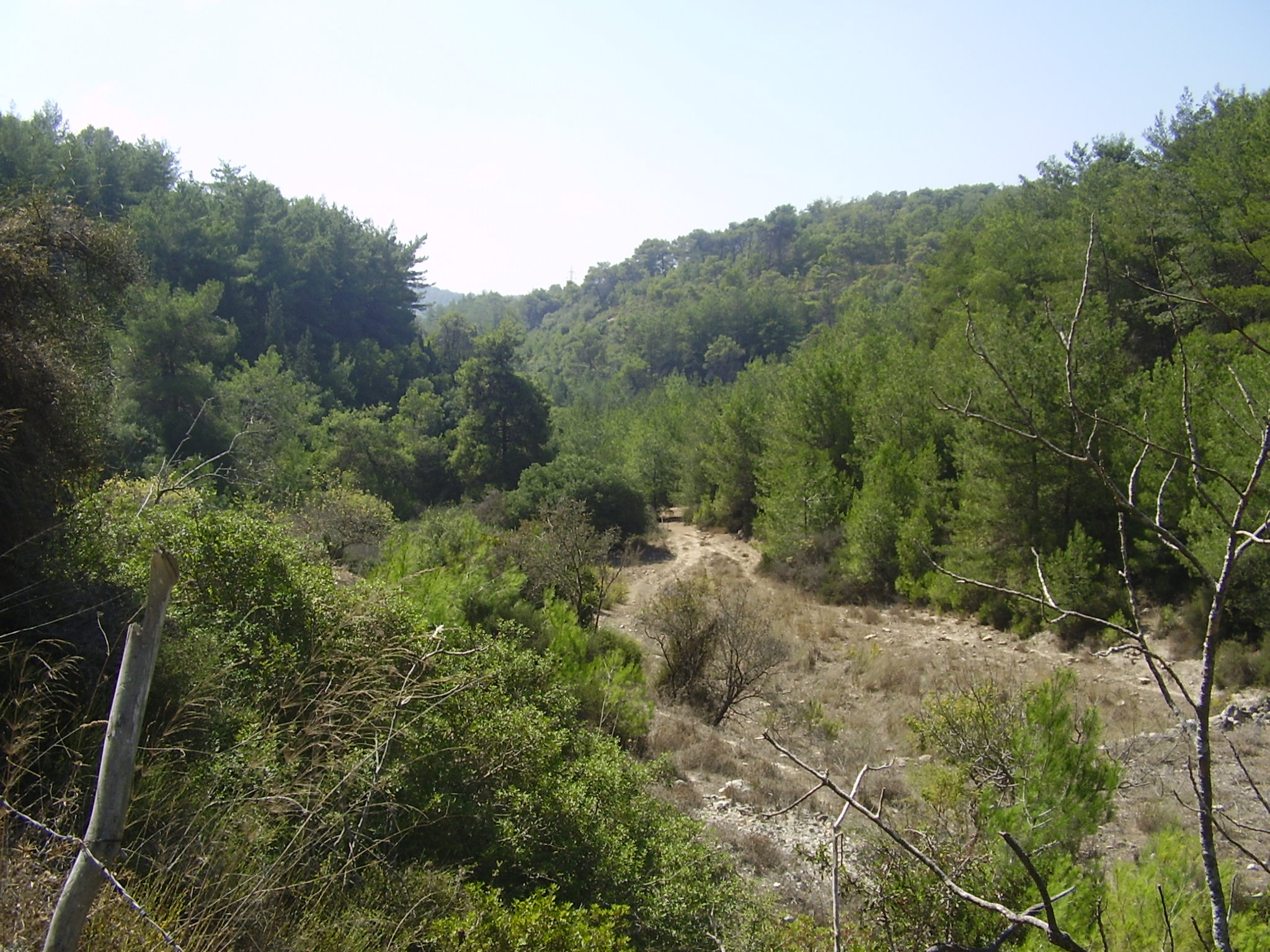 נחל חיק בהר הכרמל Mount Carmel